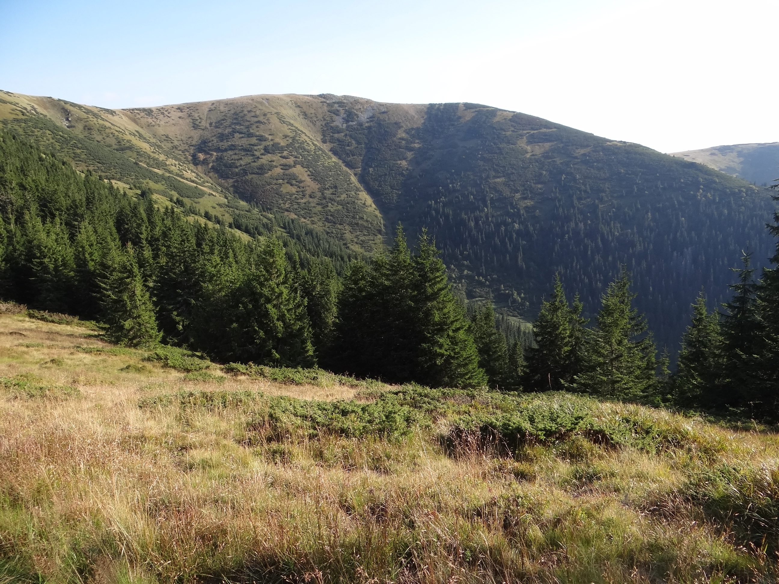 Ďurková. Widok z północnej strony (z grzbietu Zámostská hoľa)